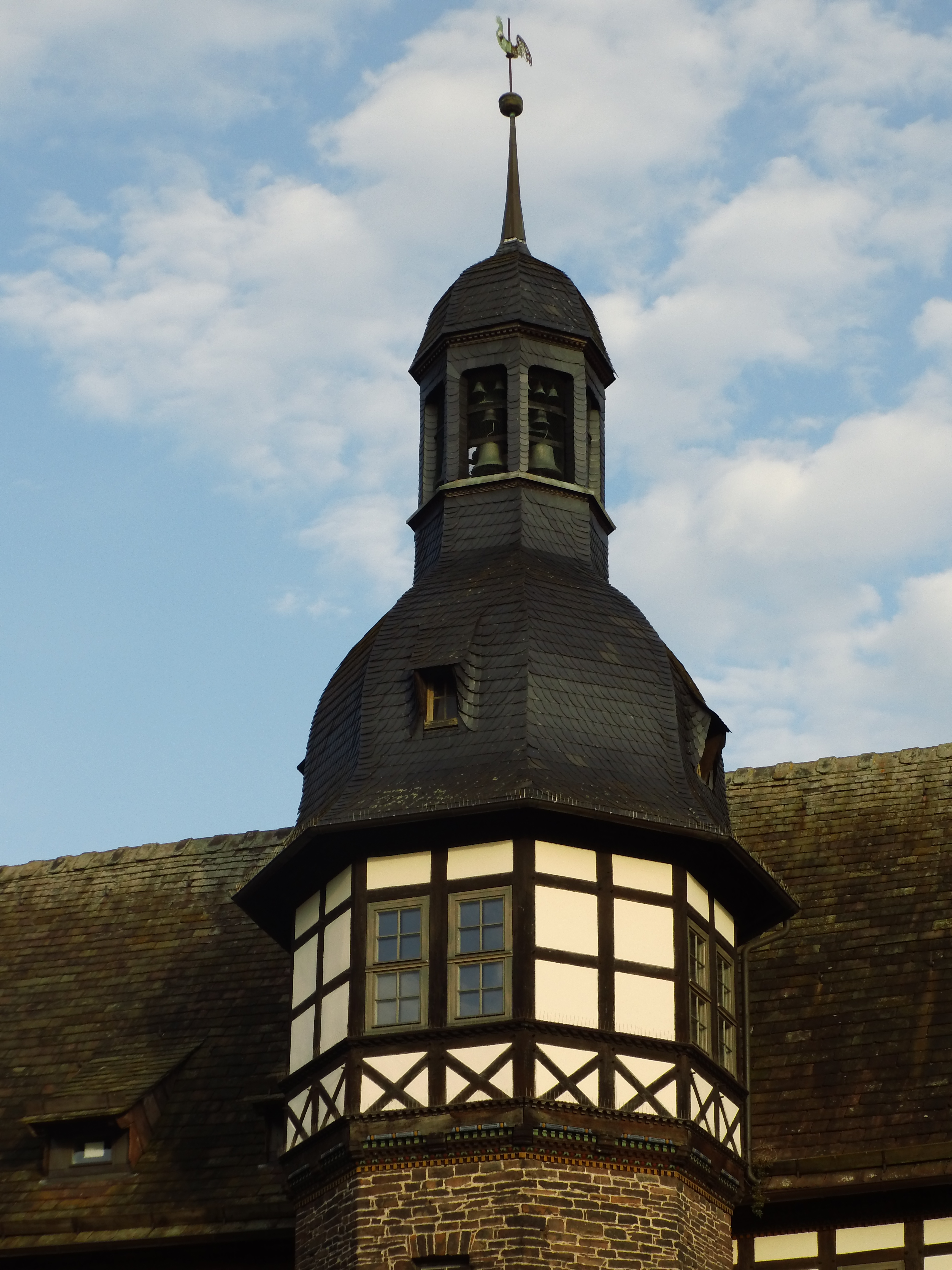 Höxter; Glockenspiel im der Turmlaterne des historischen Rathauses; Baudenkmal